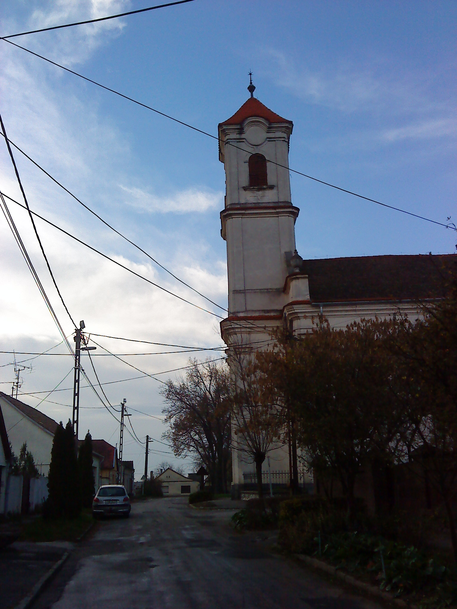 Siklós, Kálvin utca a templommal This is a photo of a monument in Hungary, Identifier: 1914